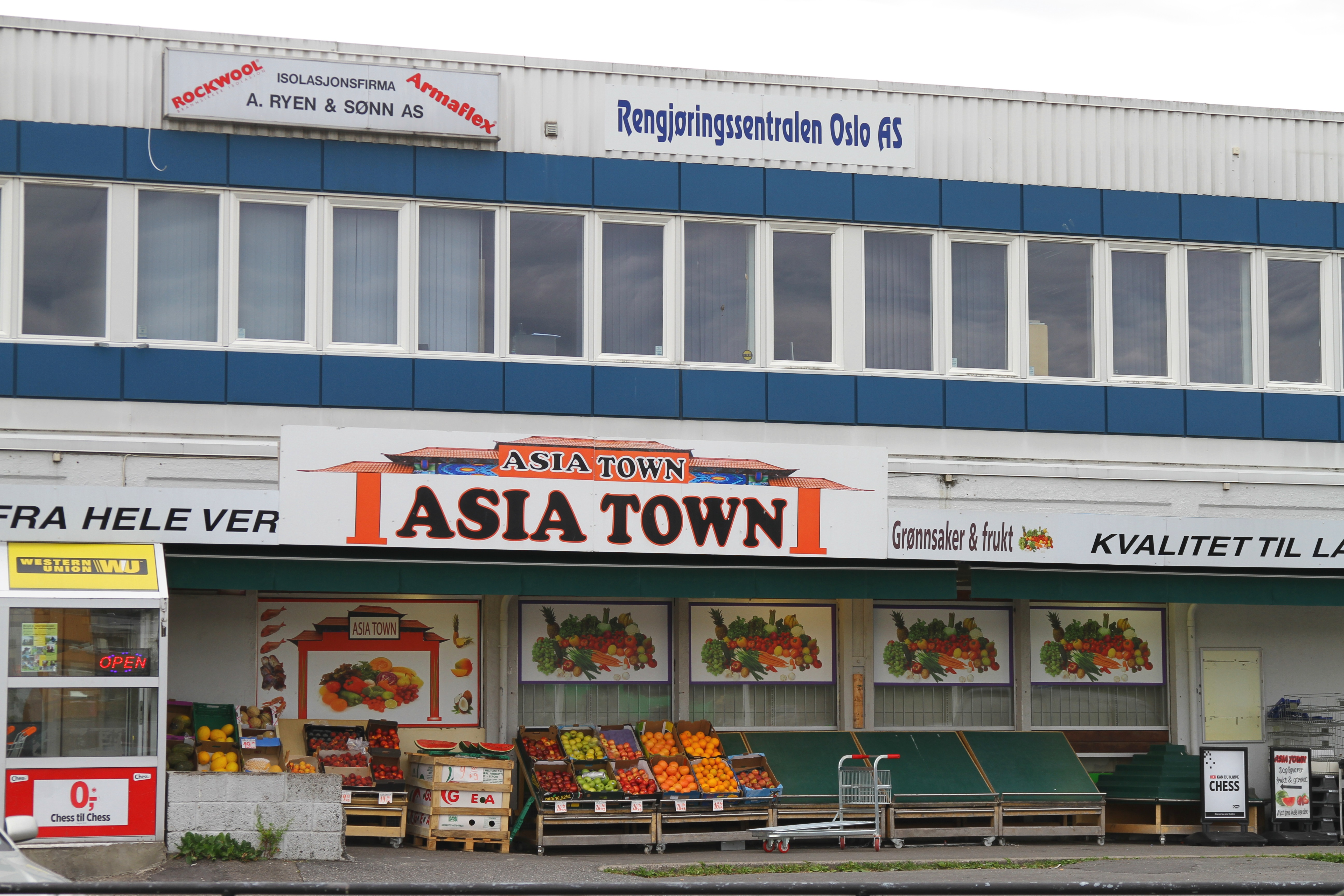 "Asia Town". Nordtvetveien 7B, Oslo.